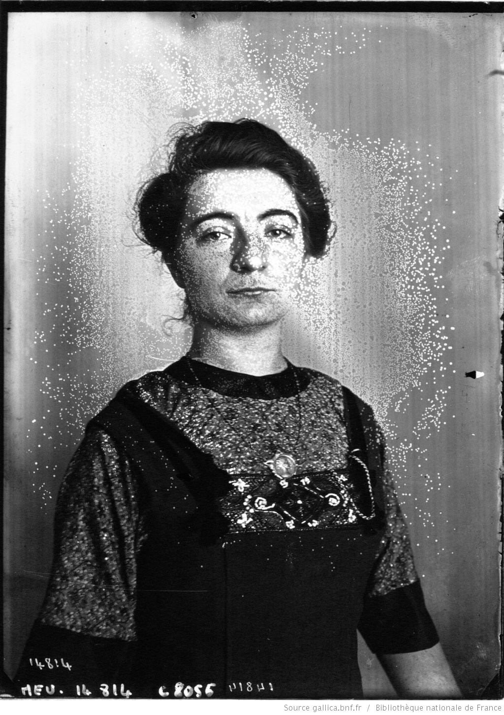 Melle Lucienne Venvelmans, prix de Rome de sculpture.